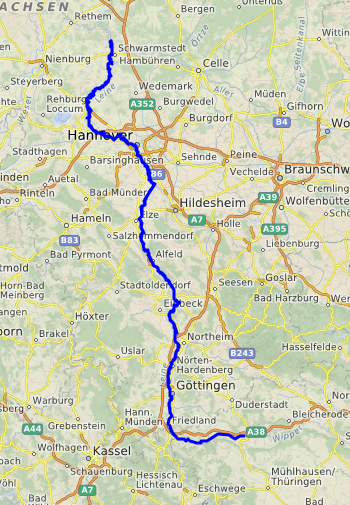 carte réalisée sur umap This map may be incomplete, and may contain errors. Don't rely solely on it for navigation.